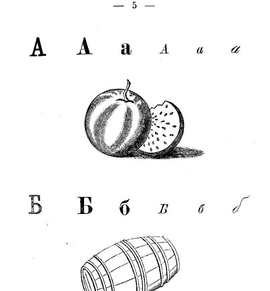 Азбука Л. Н. Толстого стр. 5